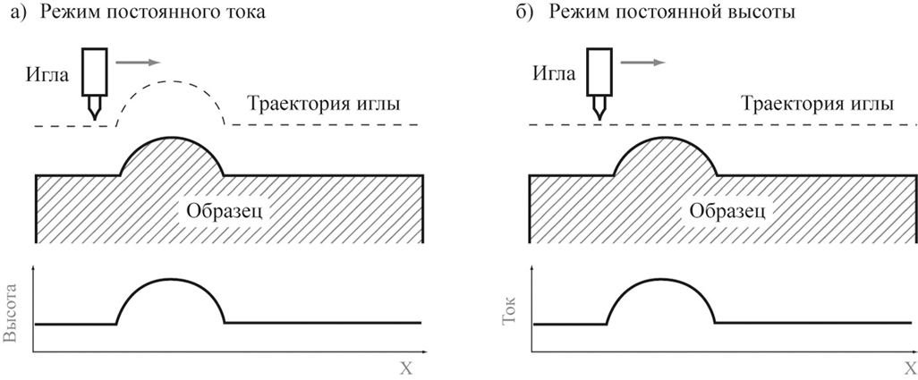 Схематическая иллюстрация работы сканирующего туннельного микроскопа (а) в режиме постоянного тока; б — в режиме постоянной высоты.